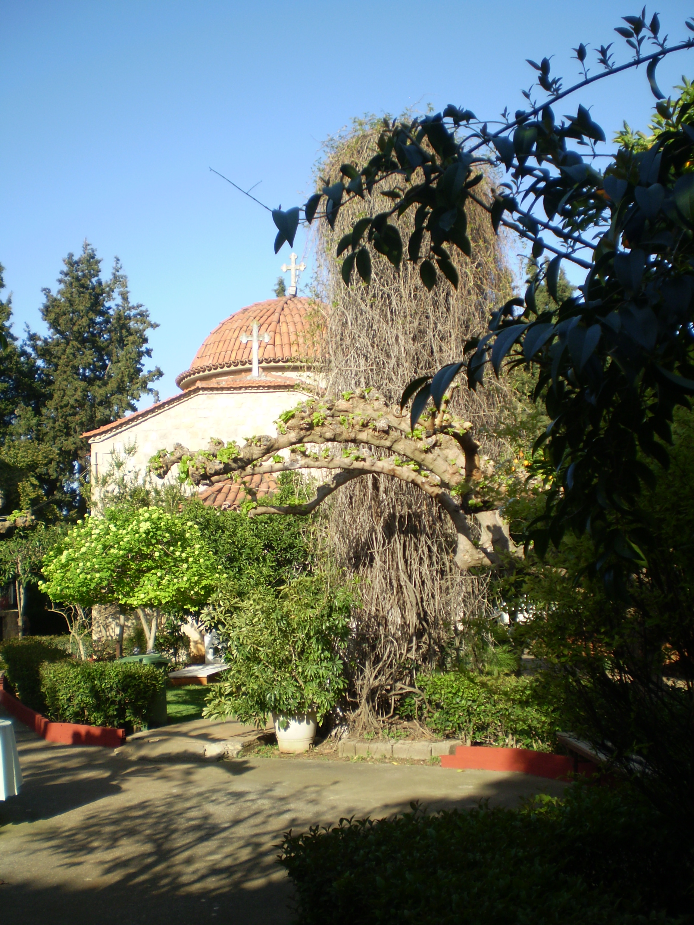 Ο Άγιος Γεώργιος Μαλεσίνας (εσωτερικό της Ιεράς Μονής Αγίου Γεωργίου Μαλεσίνας)